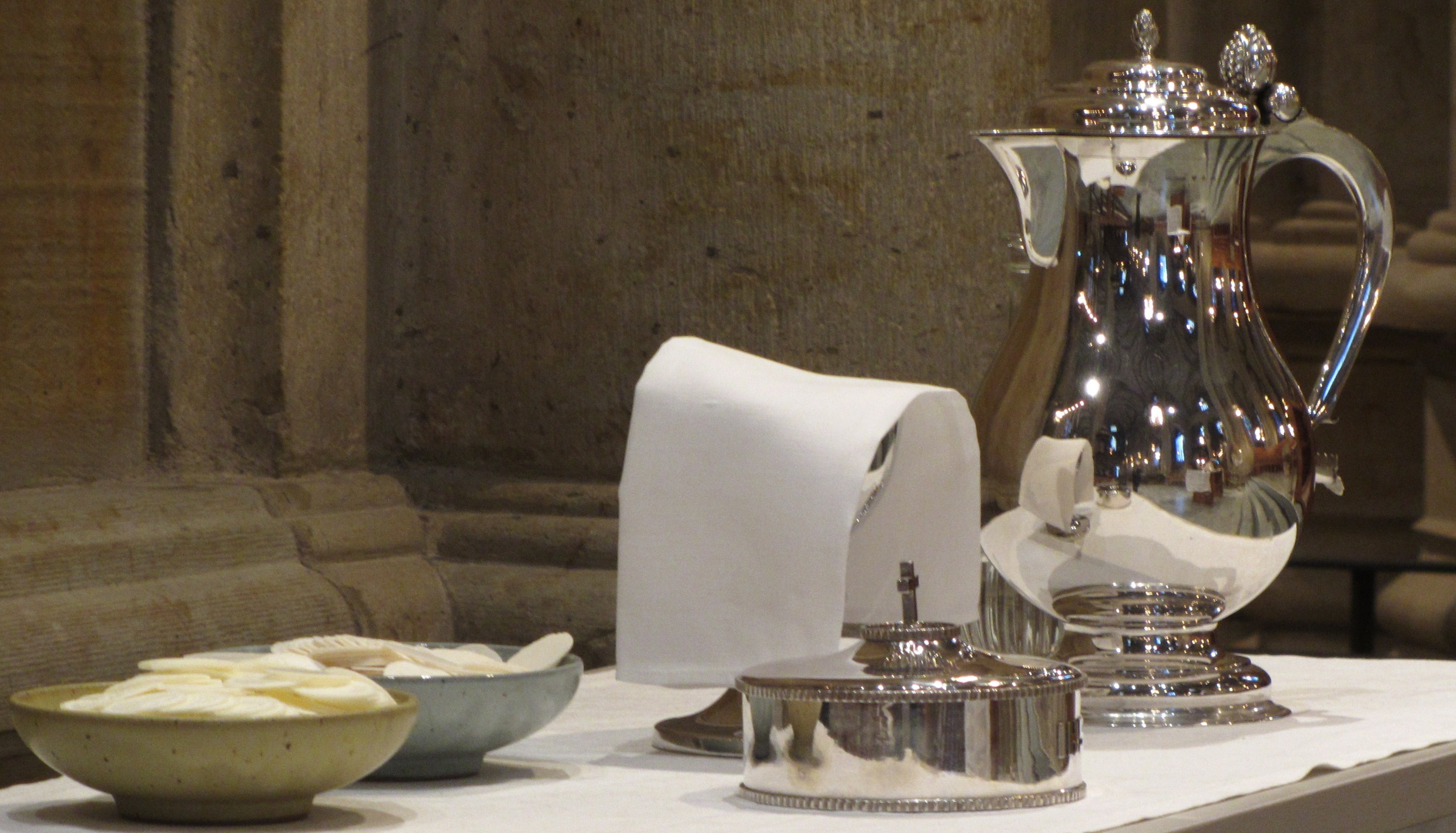 Kyrksilver i Skara domkyrka.